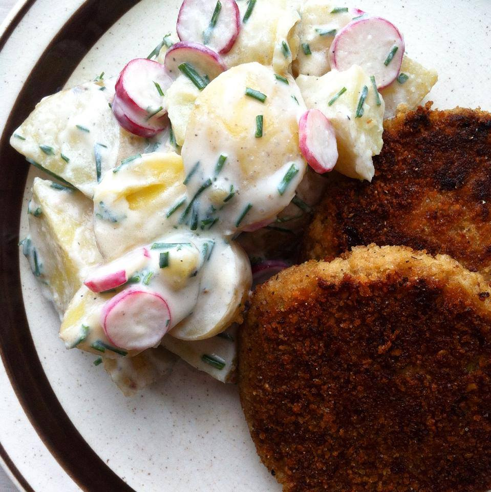 Karbonader af sojagranulat-produktet Soy4You med kartoffelsalat.